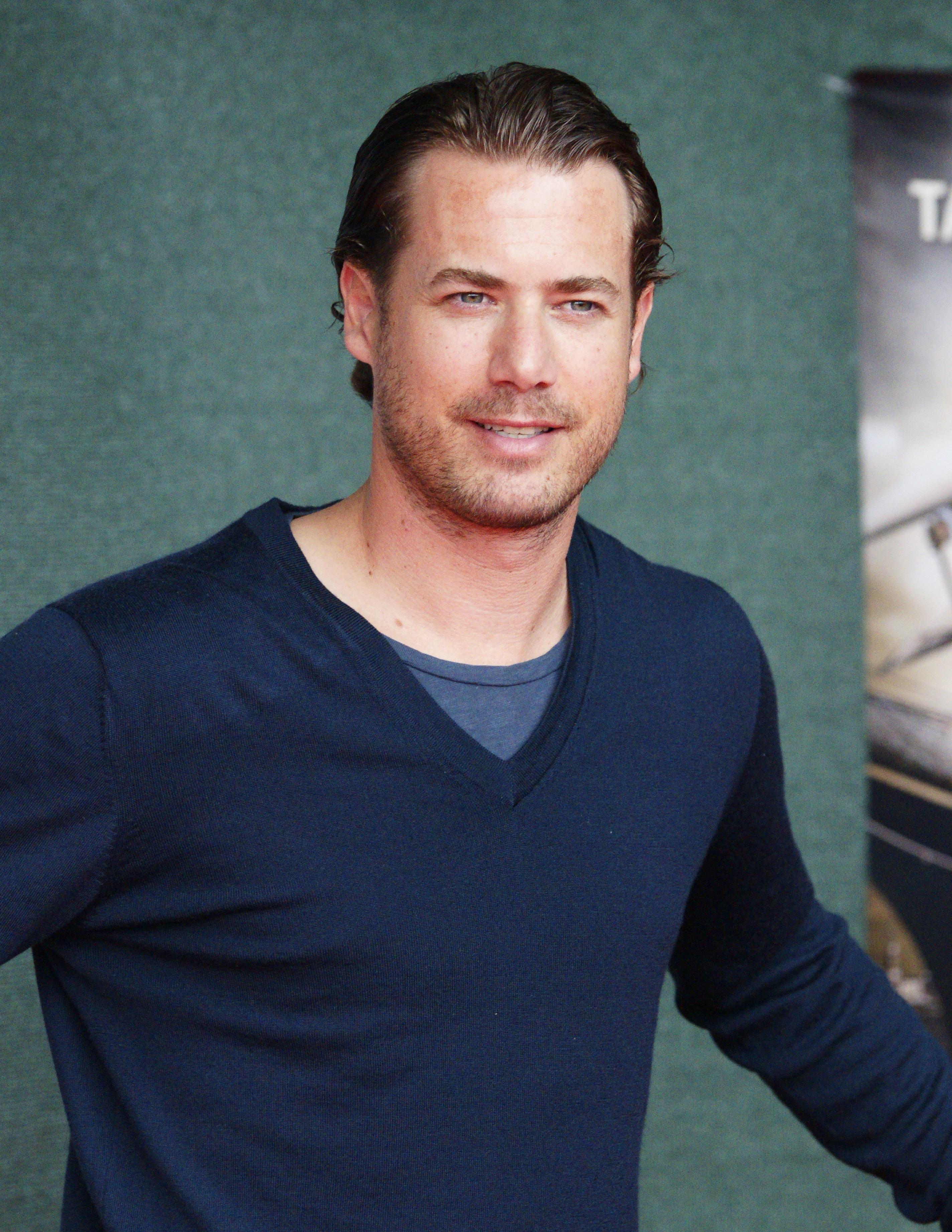 Tag der Legenden 2014 - Die Kapitäne entern Hamburg Fußballfest am Millerntor zugunsten NestWerk eV